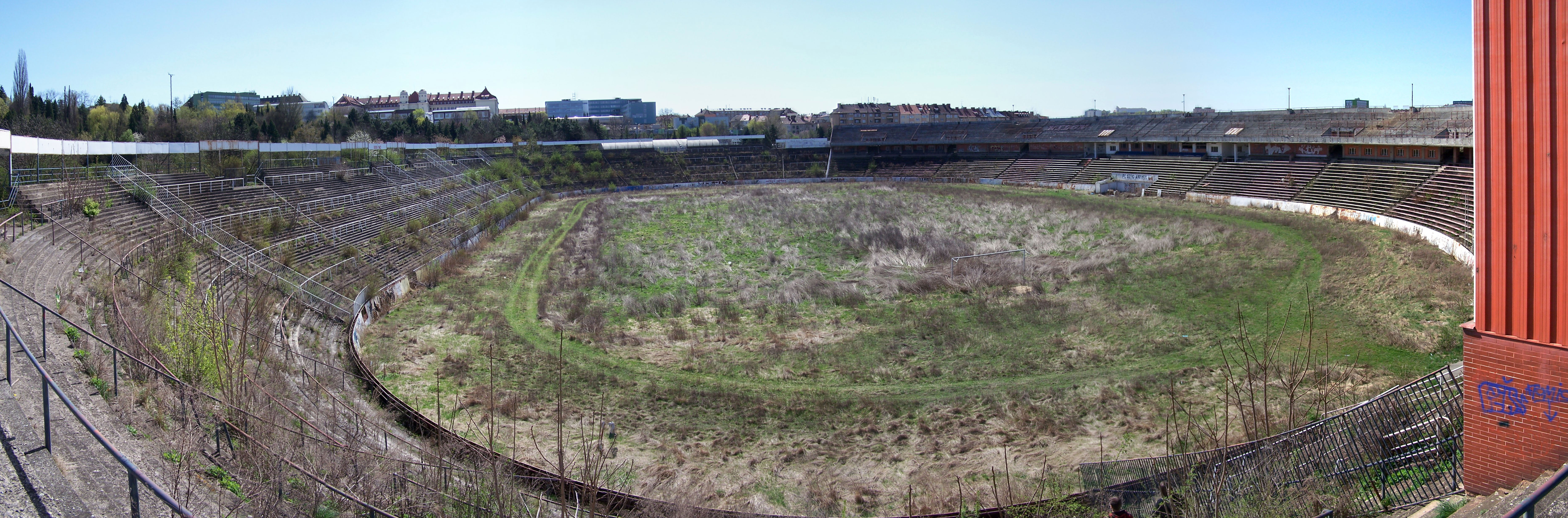 Za Lužánkami Stadium in Brno, Czech Republic